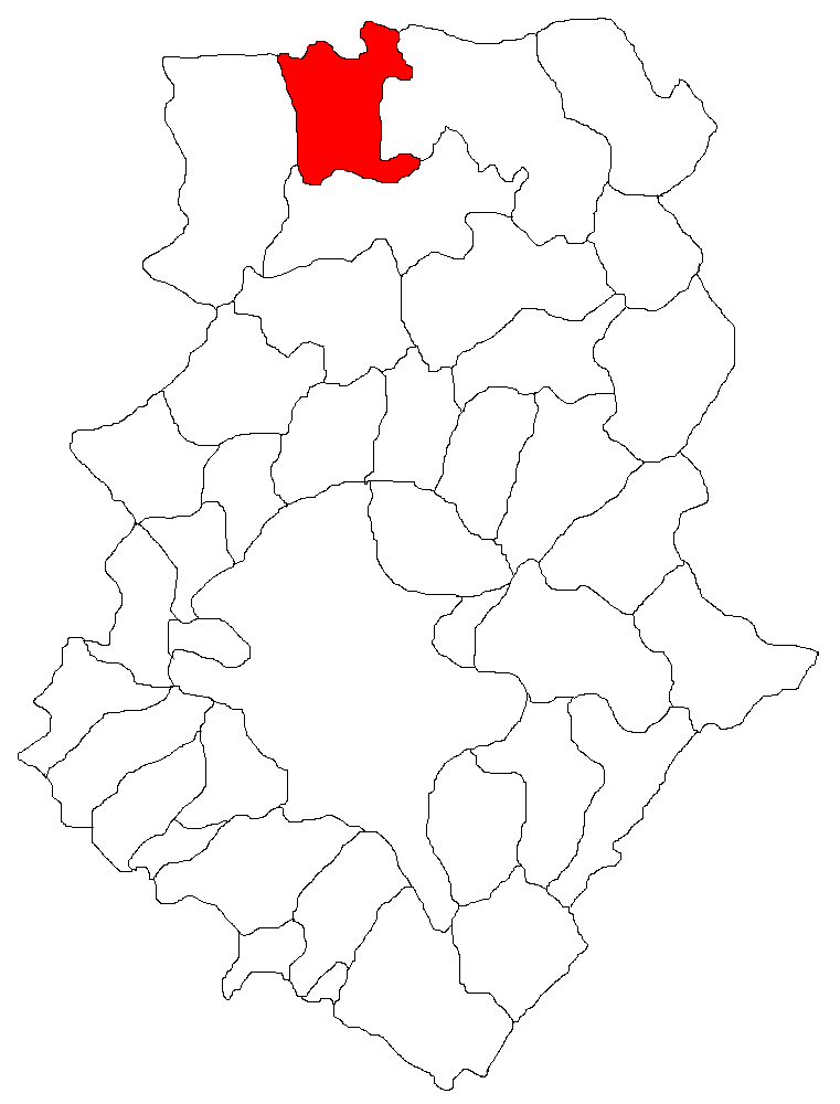 Categorie:Hărţi ale judeţului Ilfov